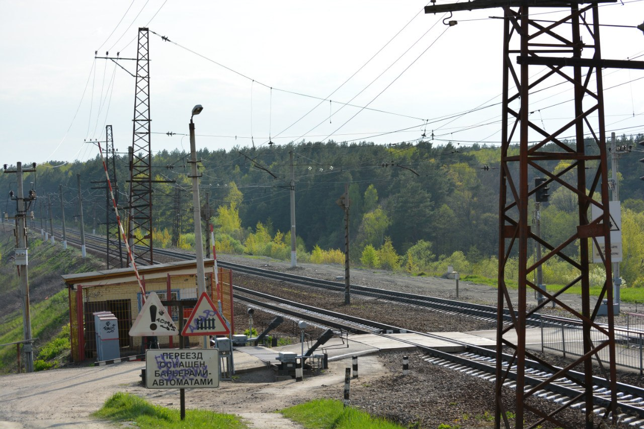 Переезд, май 2015